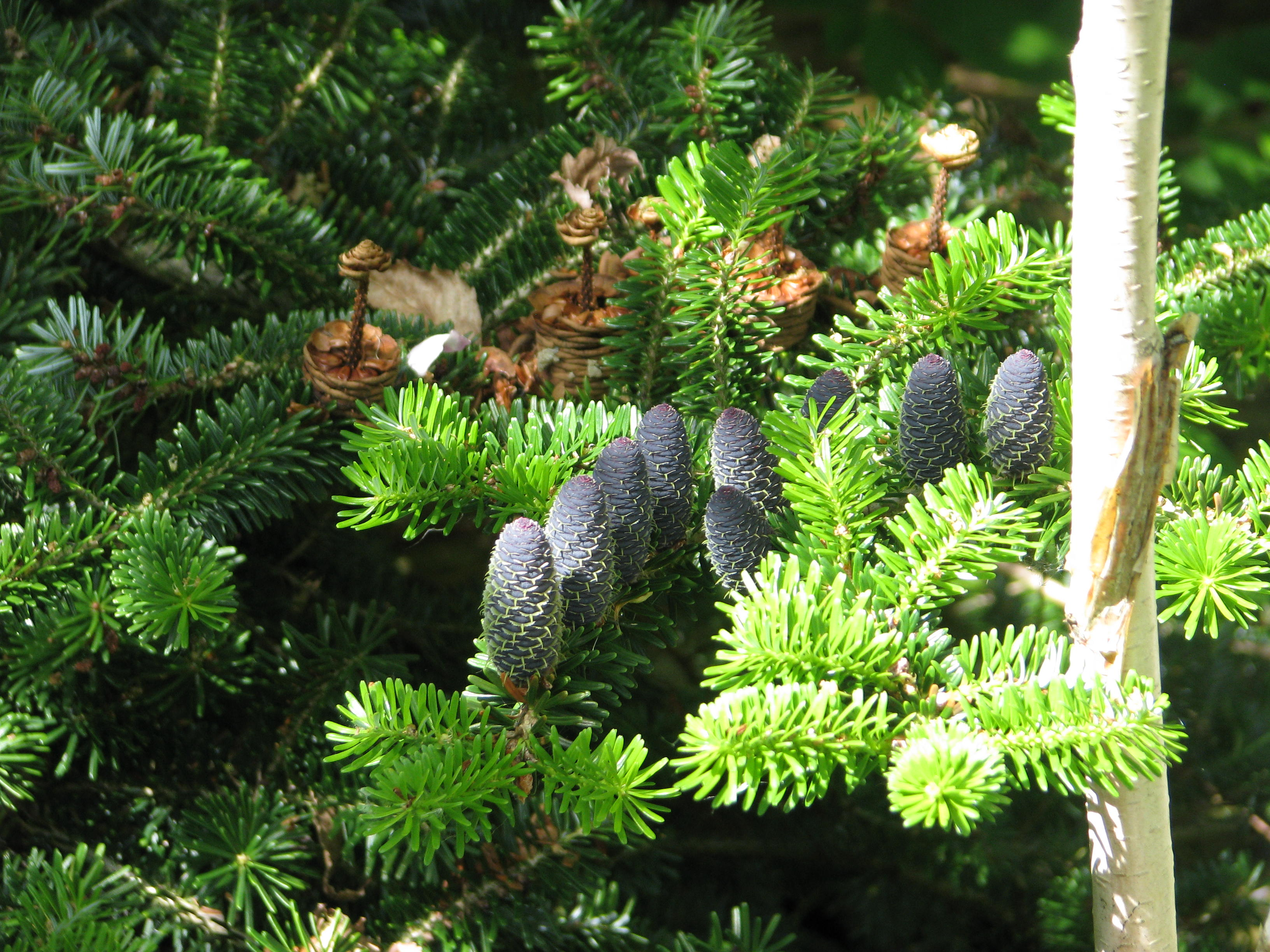 Abies koreana